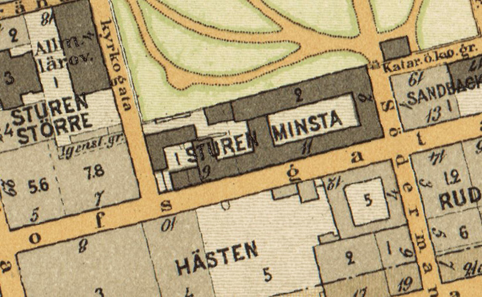 Del av Stockholmskarta visande kvarteret "Sturen Minsta"